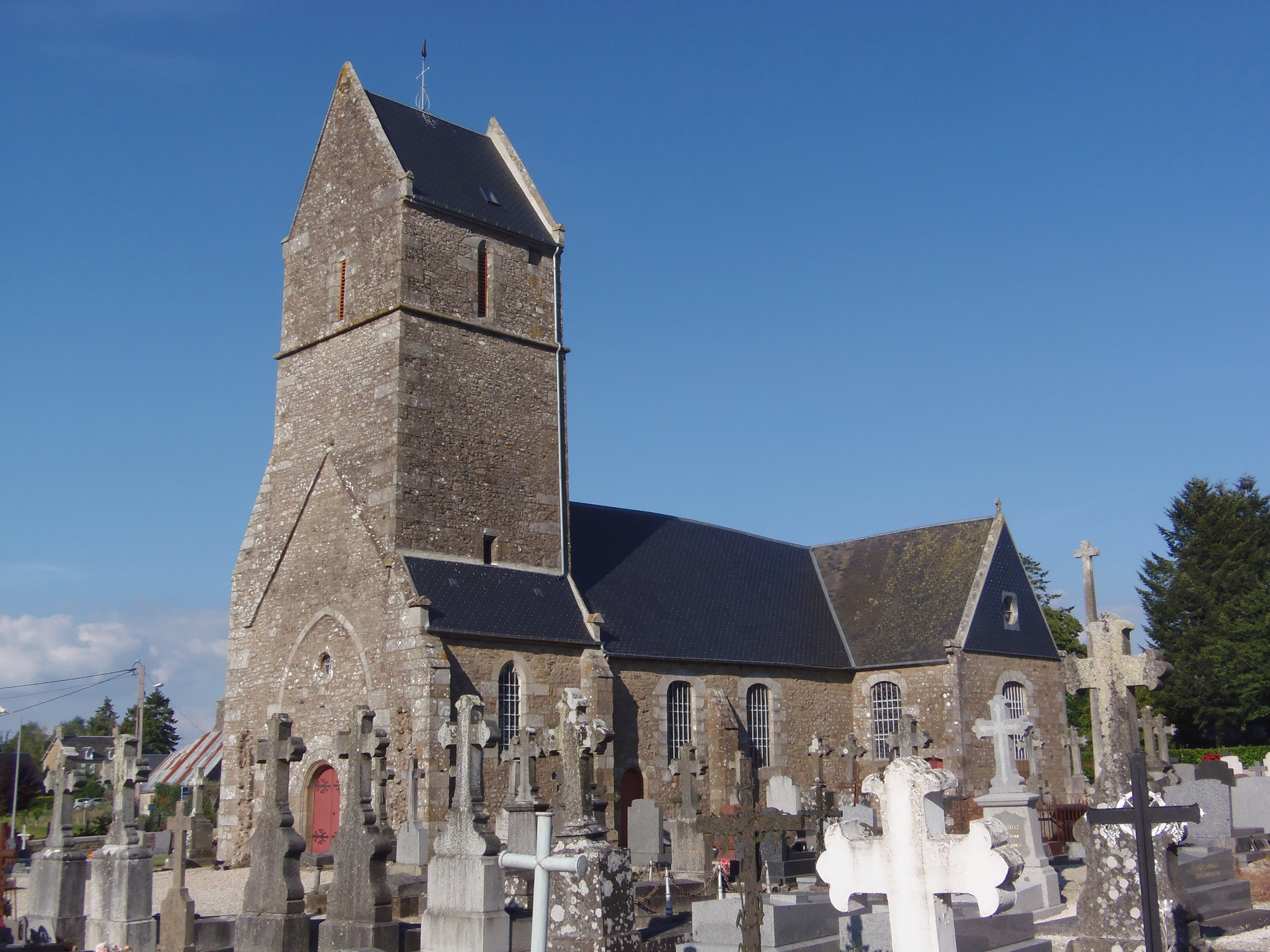 Saint-Aubin-des-Bois (Normandie, France). L'église Saint-Aubin.